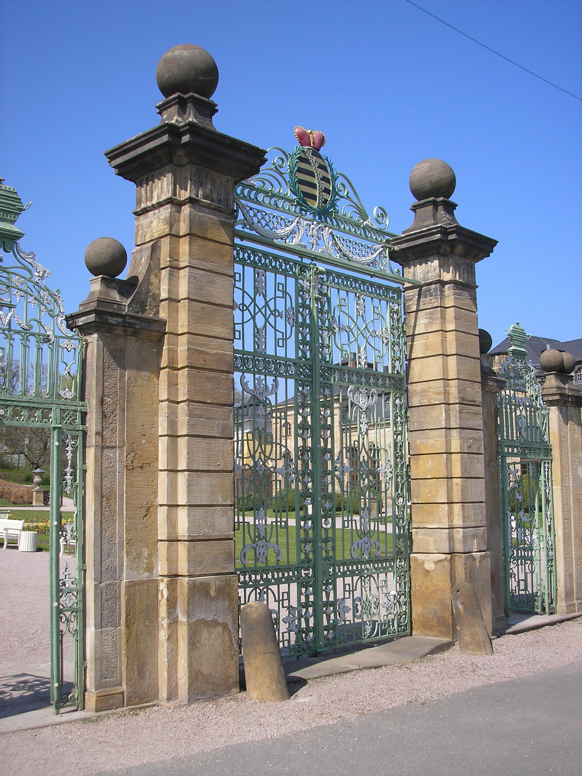 Das Tor der Orangerie in Gotha (Thüringen).